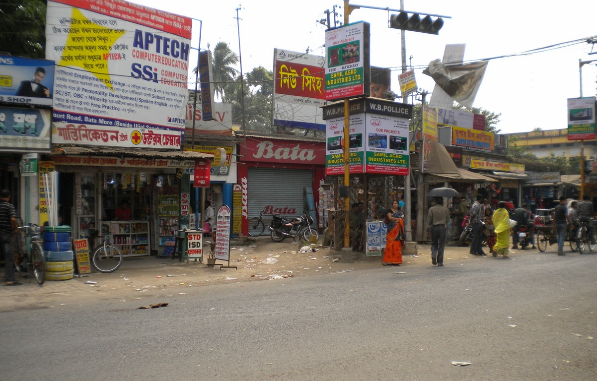 BATAMORE BONGAON